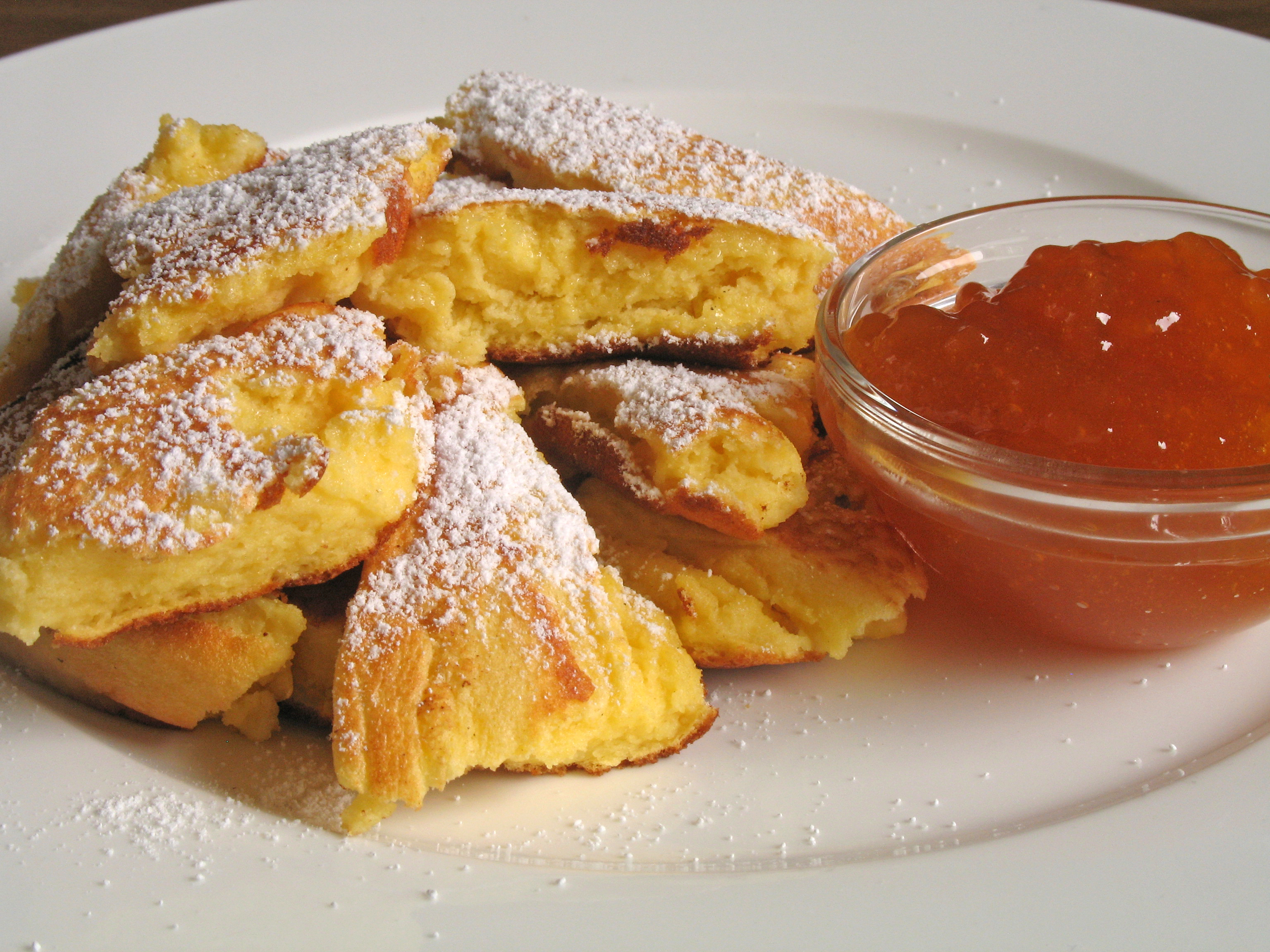 Kaiserschmarrn locker, mit aufwendiger Zubereitung durch Abtrennung des Eiklars, das zu Eischnee geschlagen wurde.